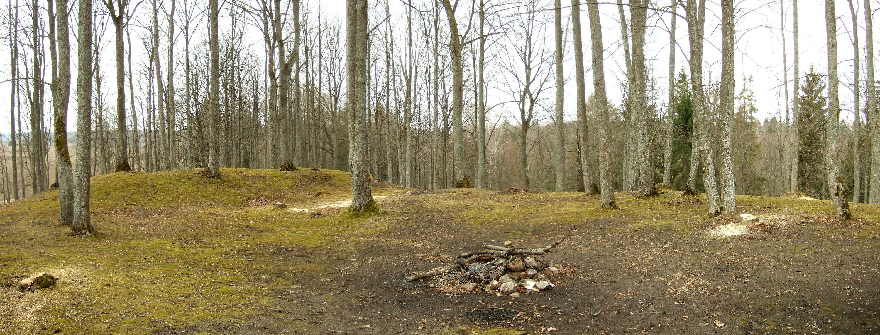 Cirkliškio piliakalnio aikštelė